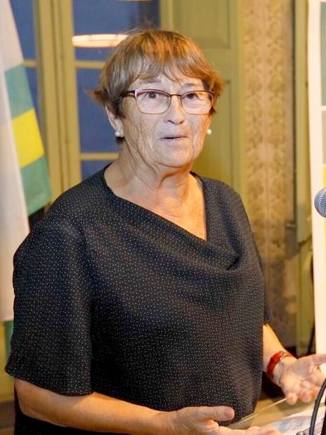 Lliurament del 6è Memorial Àlex Seglers a la Dolors Bramon i Planes © Foto: Ajuntament de Sabadell / Juanma Peláez